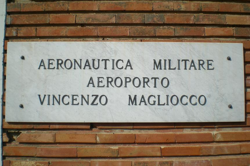 Targa all'ingresso dell'Ex Aeroporto Militare Vincenzo Magliocco di Comiso.